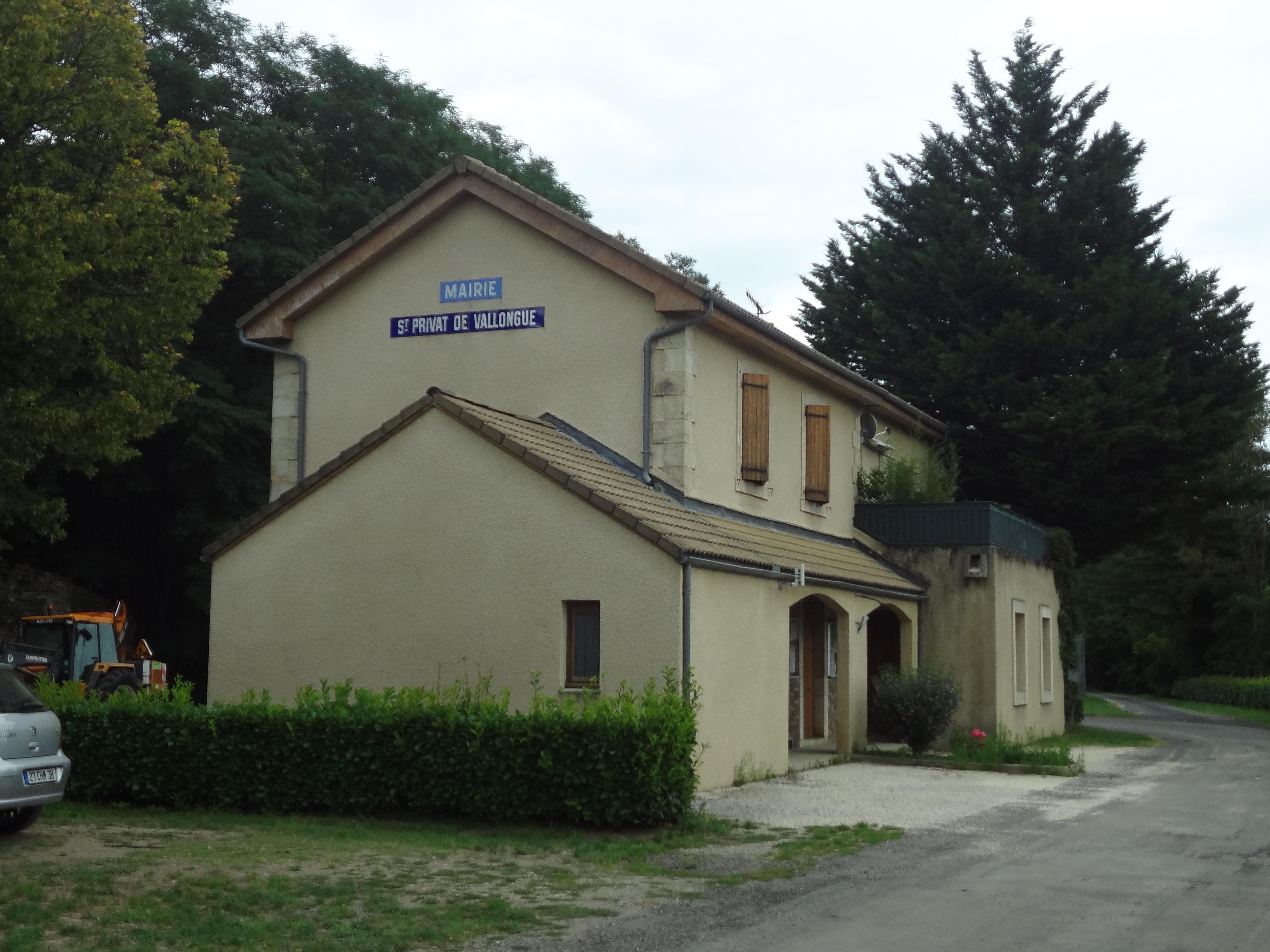 Saint-Privat-de-Vallongue, mairie